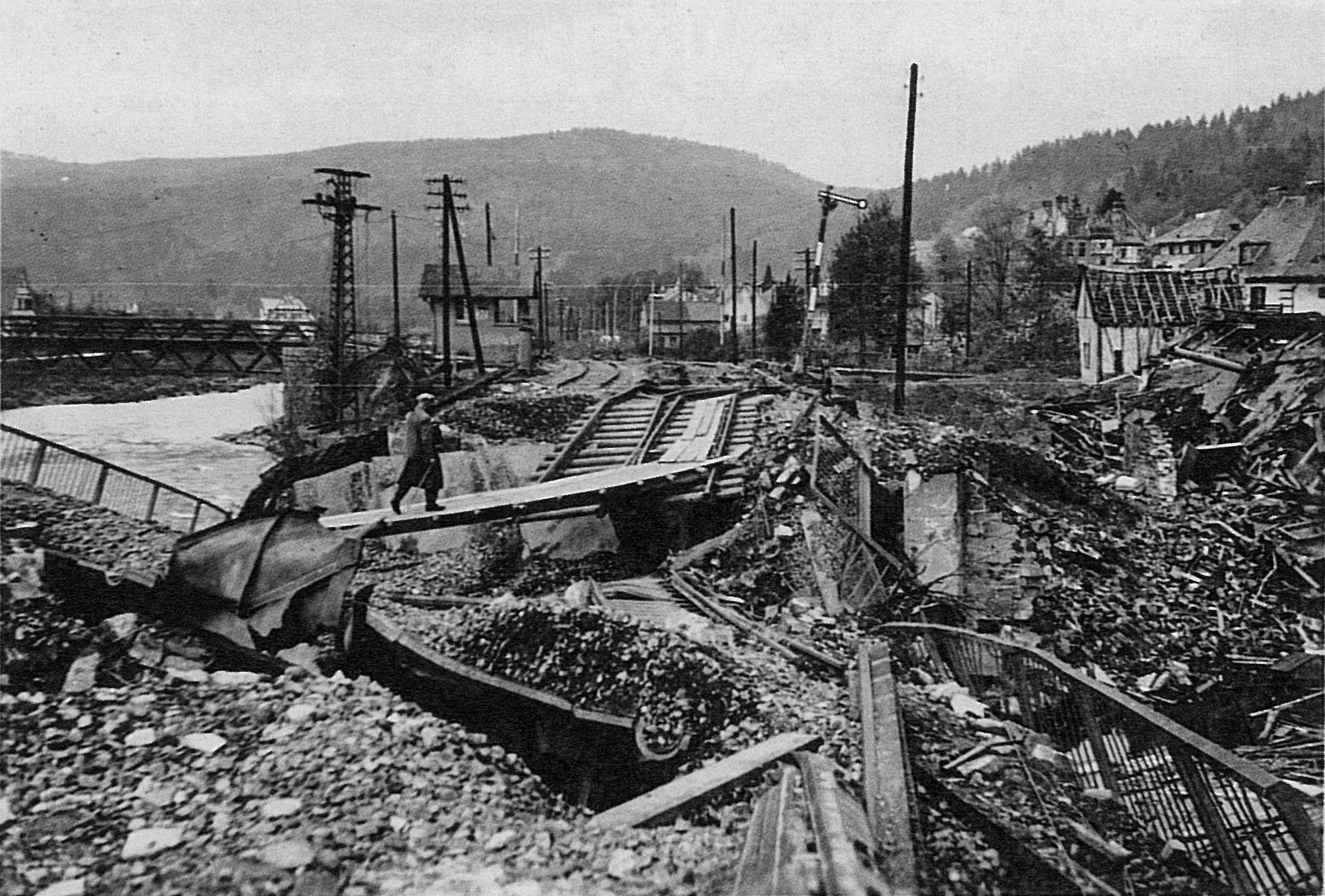 Behelfsbrücke über zerstörtes Bahngleis (Ausschnitt)